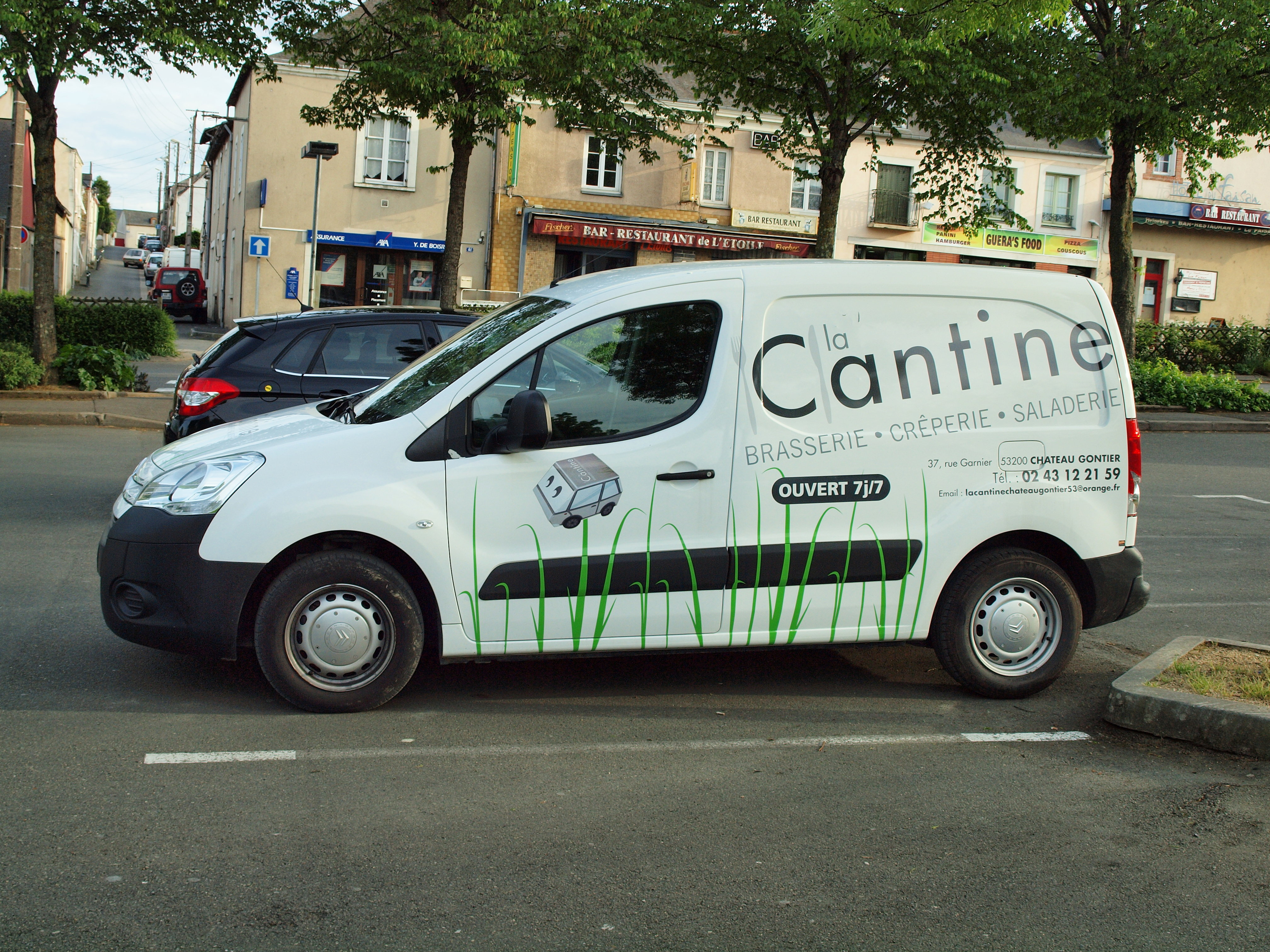 Château-Gontier (Mayenne, France)